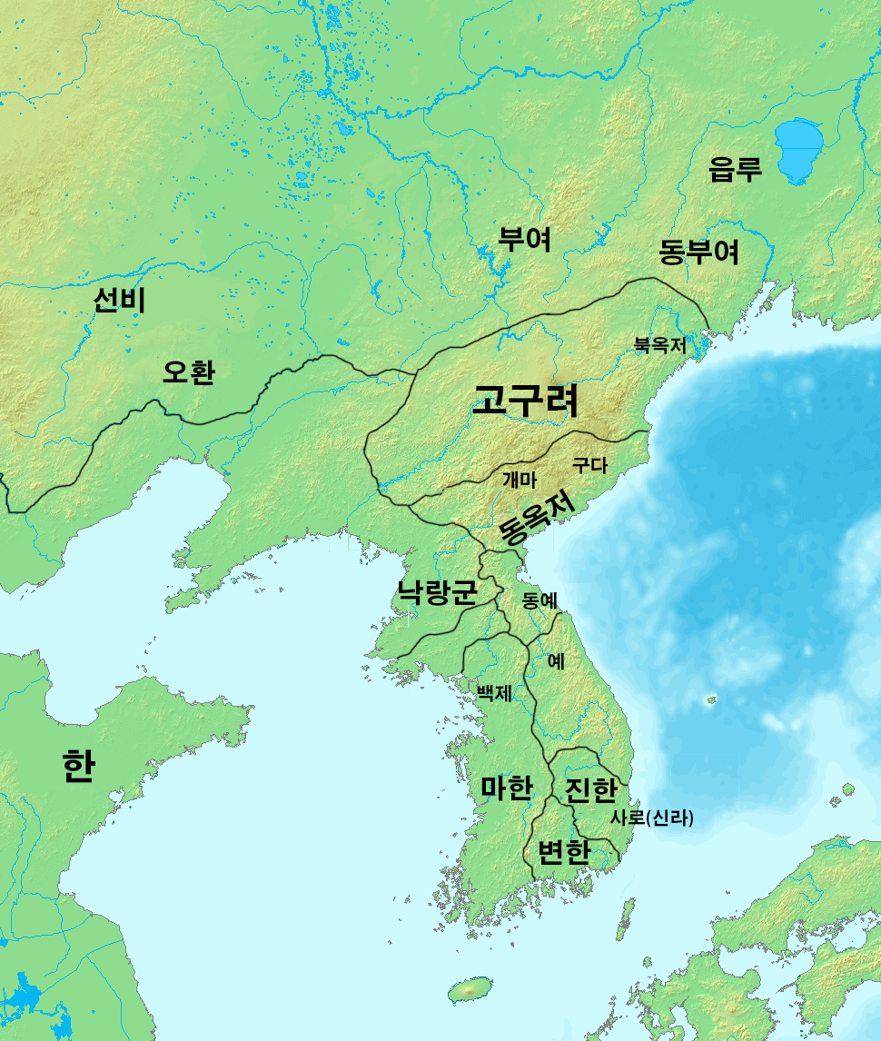 원삼국시대, 기원후 1세기 무렵